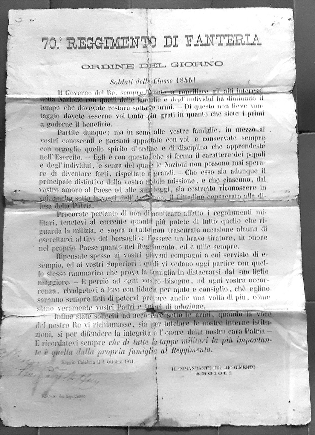 70° Reggimento di Fanteria - Ordine del giorno - Soldati della classe 1846 - appartenuto a Raffaele Stanzani